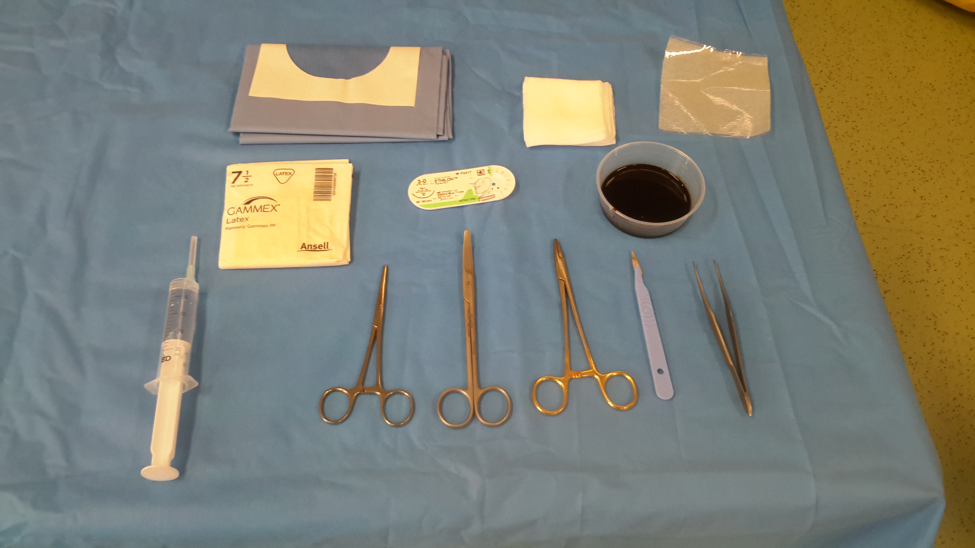 Table d'instruments chirurgicaux pour ongle incarné.